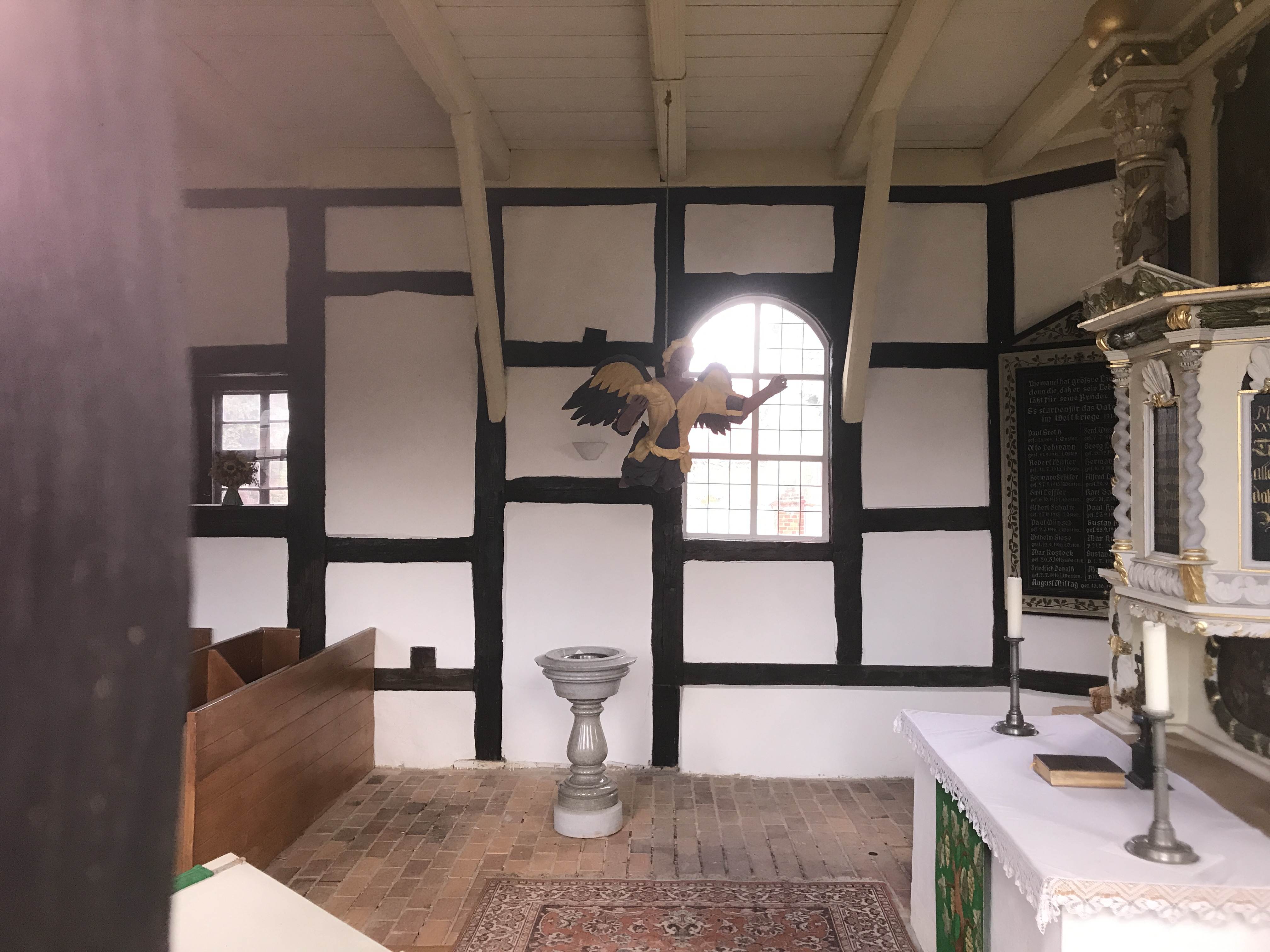 Die Dorfkirche in Rietzneuendorf der Gemeinde Rietzneuendorf-Staakow im Landkreis Dahme-Spreewald ist eine Fachwerkkirche aus dem 1704. Im Innern hängt unter anderem ein Taufengel, der der Werkstatt von Tobias Mathias Beyermann zugeschrieben wird.